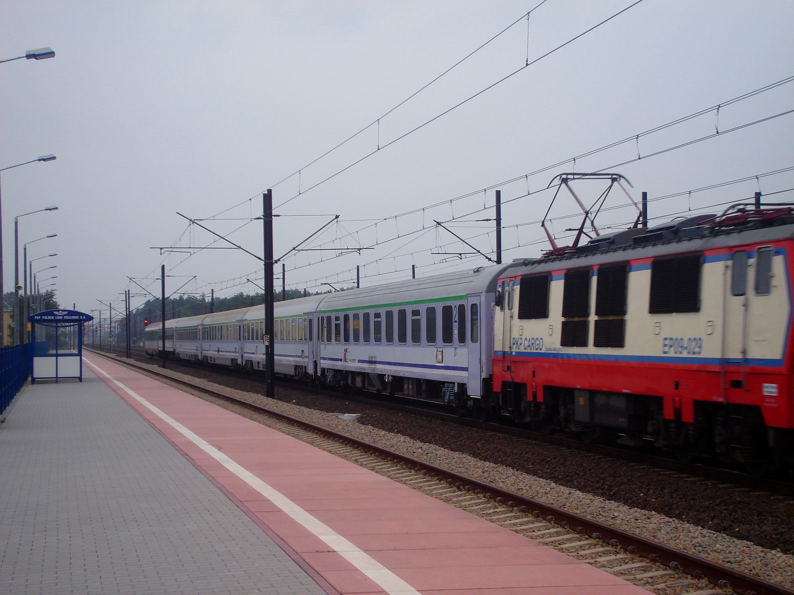 Przystanek kolejowy Włoszczowa Północ